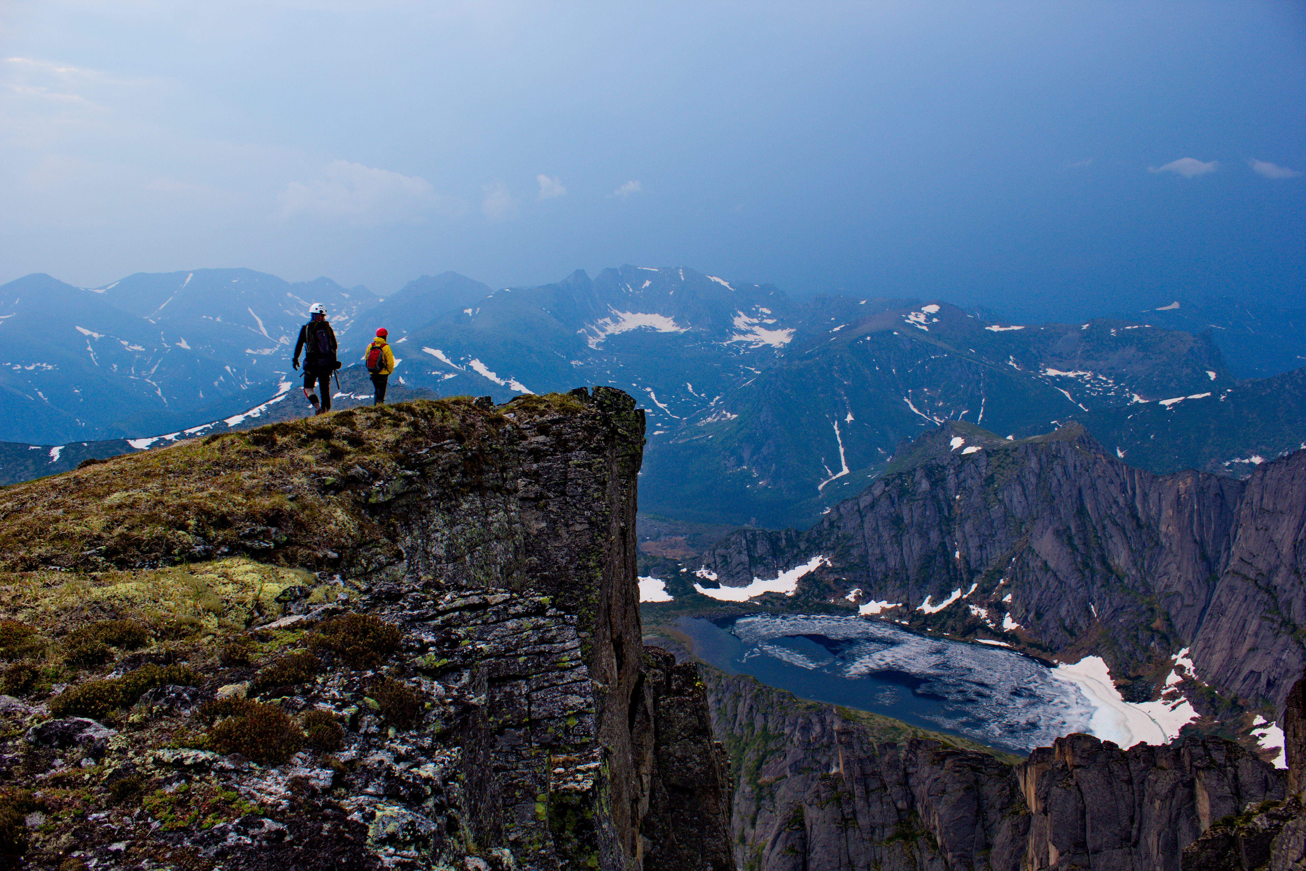 Неприступный пик, хребет Дуссе-Алинь.